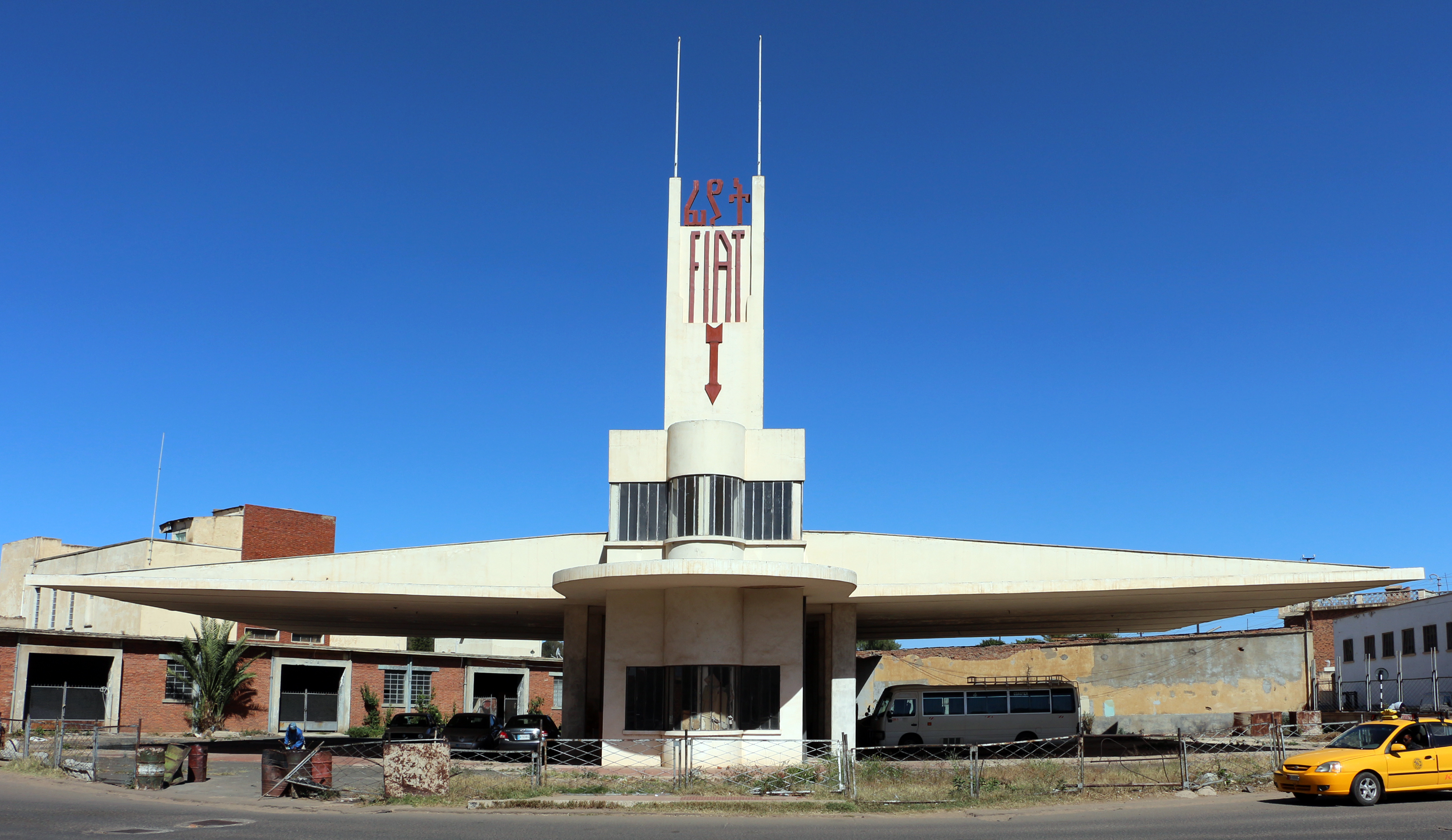 Fiat tagliero, 04.JPG